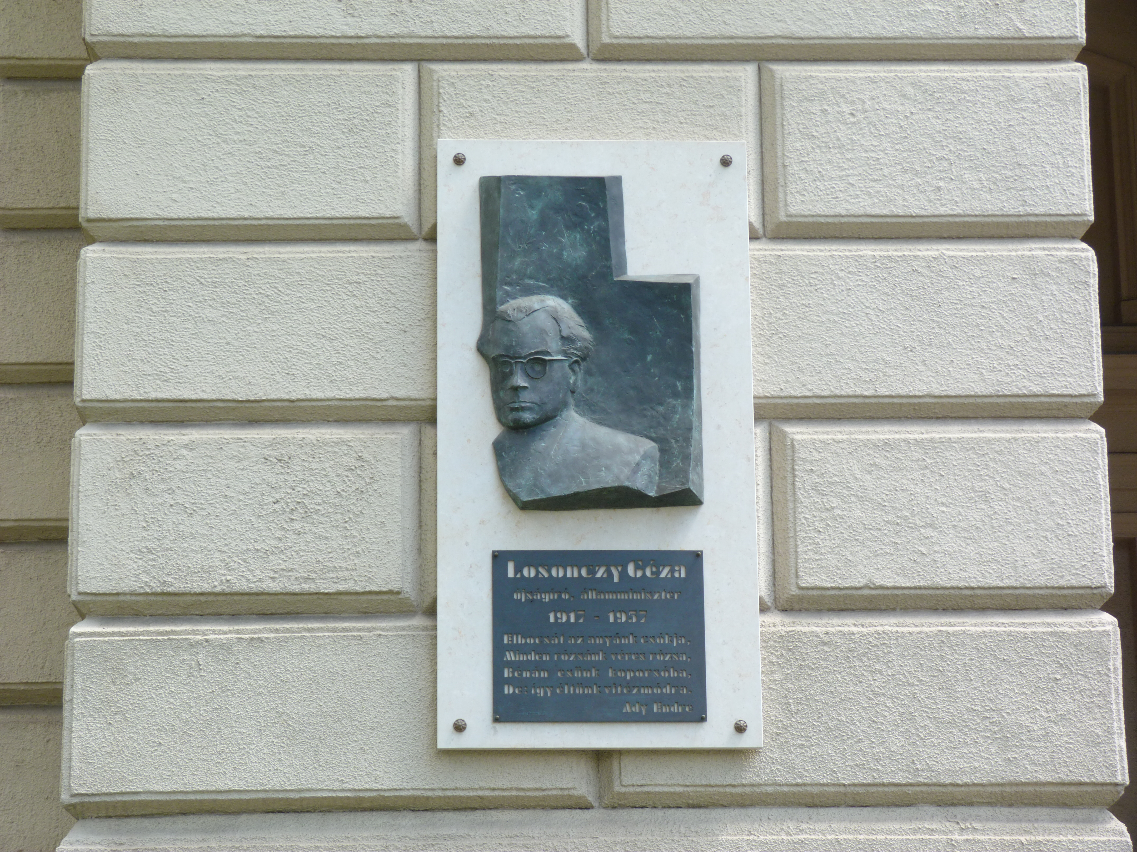 A felvétel 2012. május 19 -én készült Budapesten, a Kossuth téren. Losonczy Géza emléklapja.